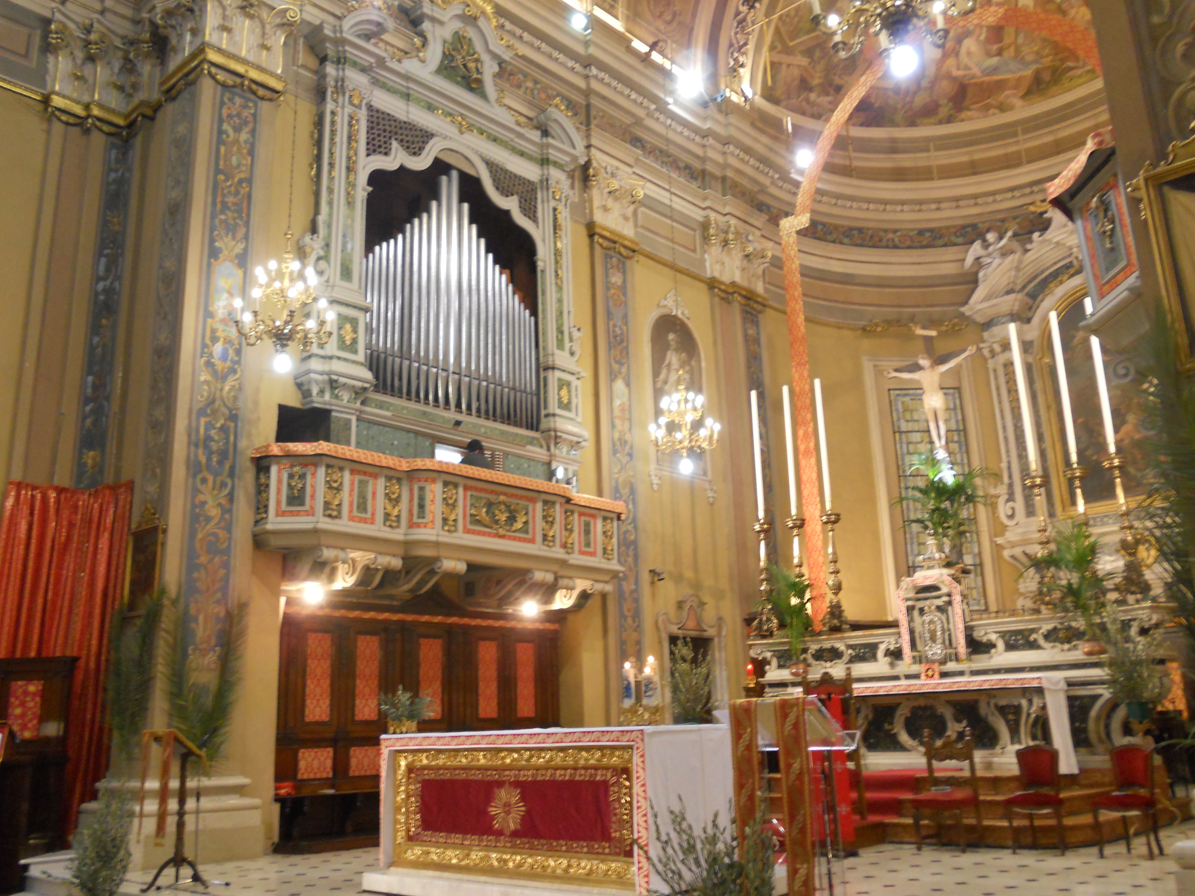 Presbiterio della Chiesa parrocchiale dei Santi Pietro e Paolo di Verolavecchia